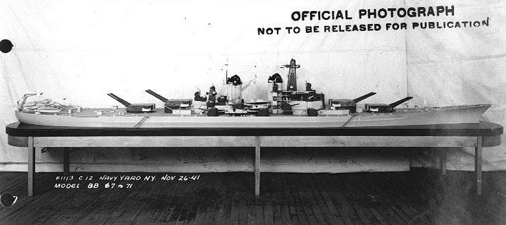 Montana-Class Model